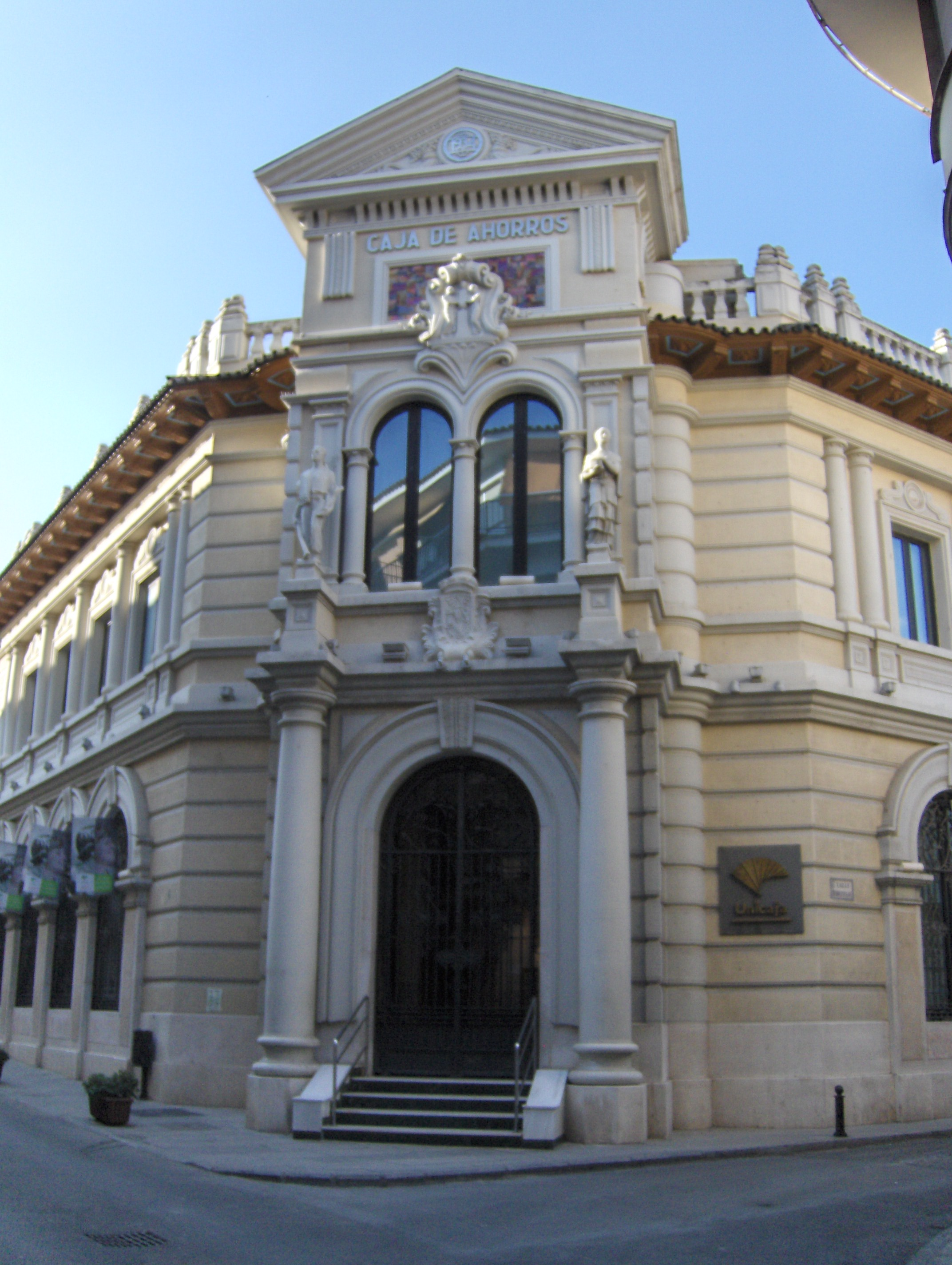 Caja de Ahorros de Antequera, (actual Unicaja), Antequera, España.